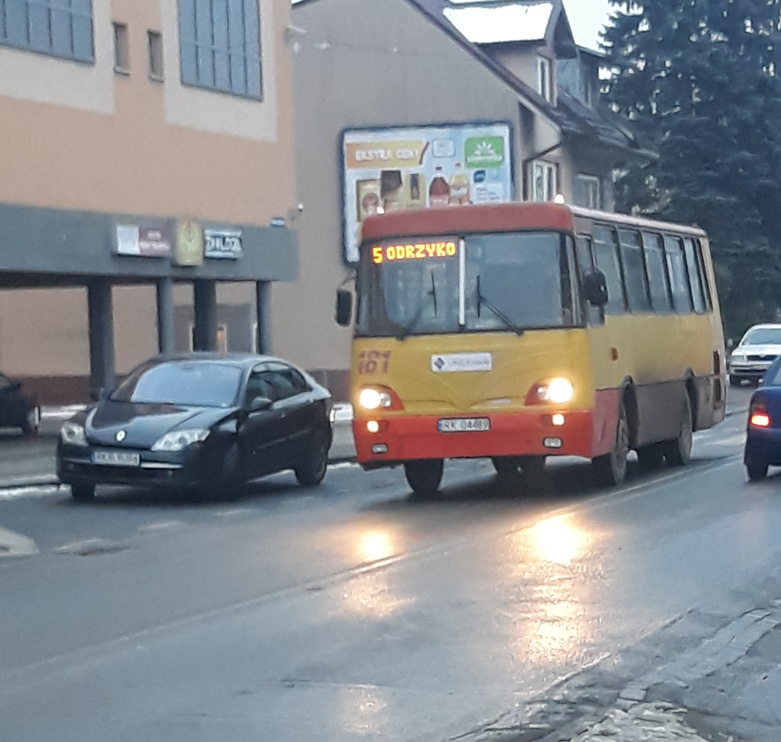 Autobus Autosan H9-35 należący do MKS Krosno podczas obsługi linii "5"